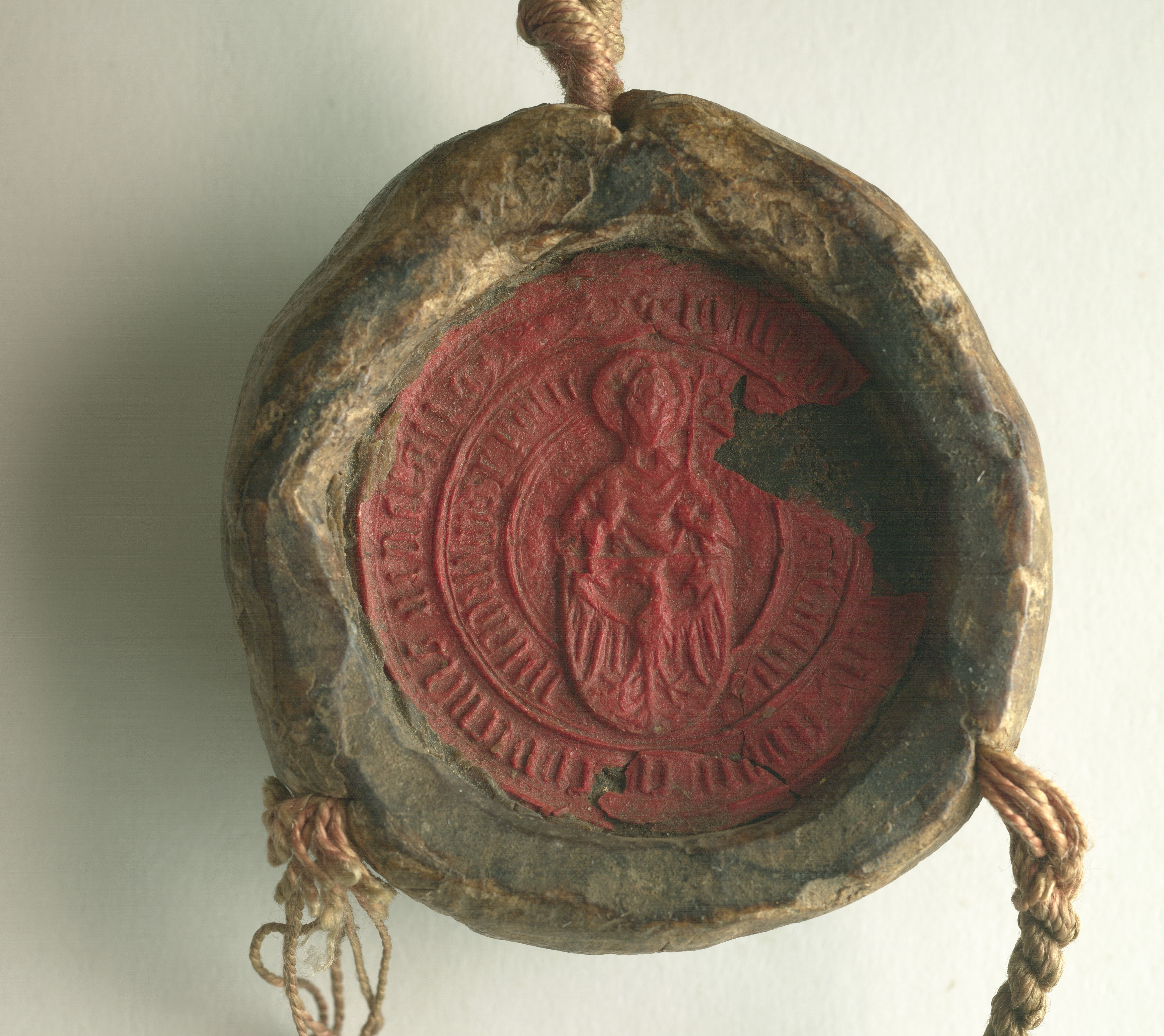 Pieczęć Uniwersytetu Jagiellońskiego. W polu pieczęci św. Stanisław z prawą ręką uniesioną w geście błogosławieństwa, a w lewej trzymający pastorał, oparty o tarczę z orłem. Nieco ukruszona. Pieczęć odciśnięta w czerwonym wosku, na różowym sznurze; średnica: 4 cm. Podwójny otok: S+IGILLUM UNIVERSITATIS STUDII CRACOVIENSIS GENERALIS SANCTUS STASLWS + WLADISLAWS R. POLIE.